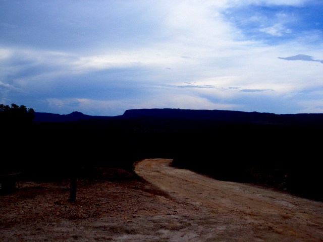 Cerrado, Pirenópolis